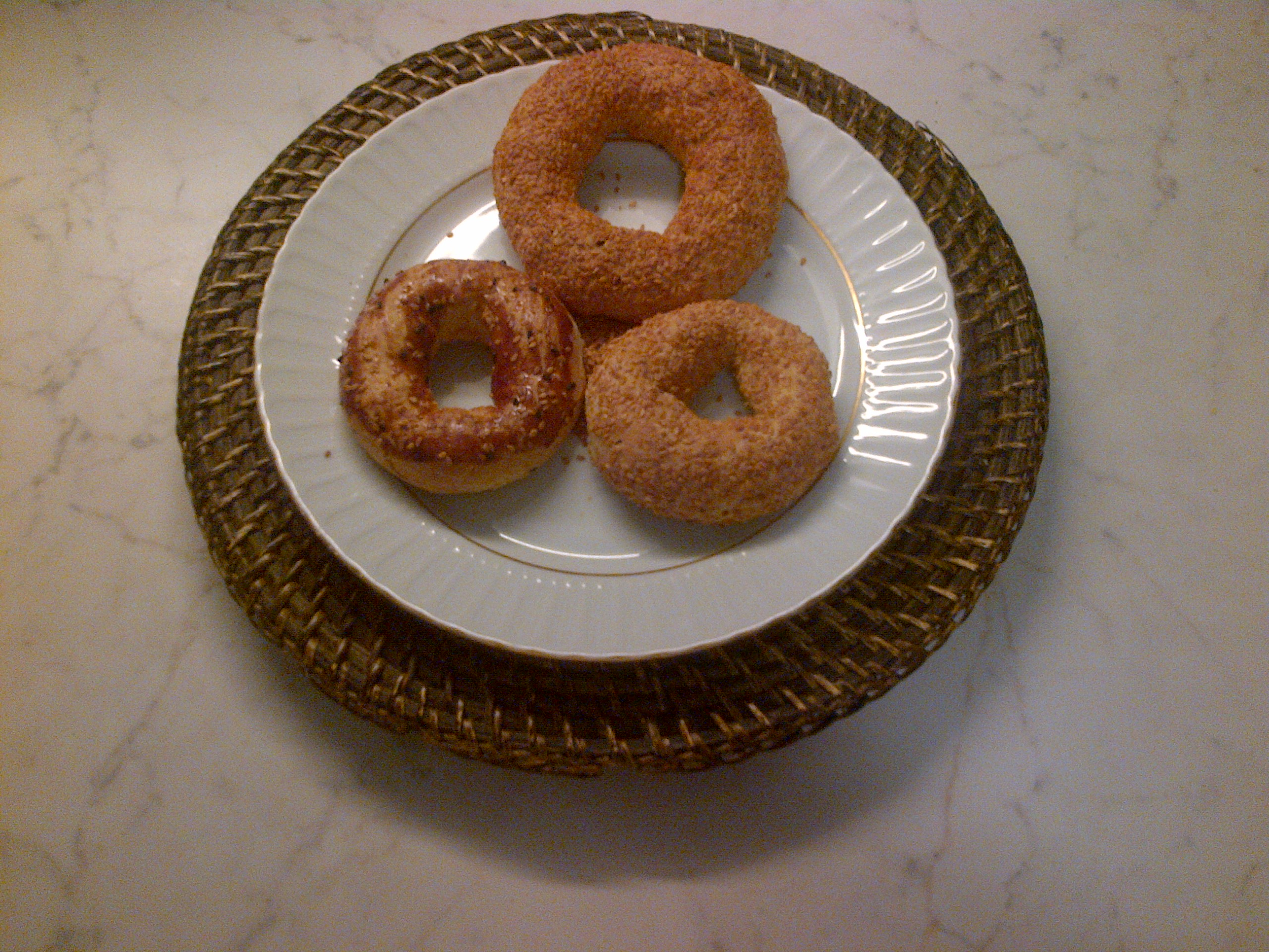 Tres variedades de "kandil simidi" de Turquia.